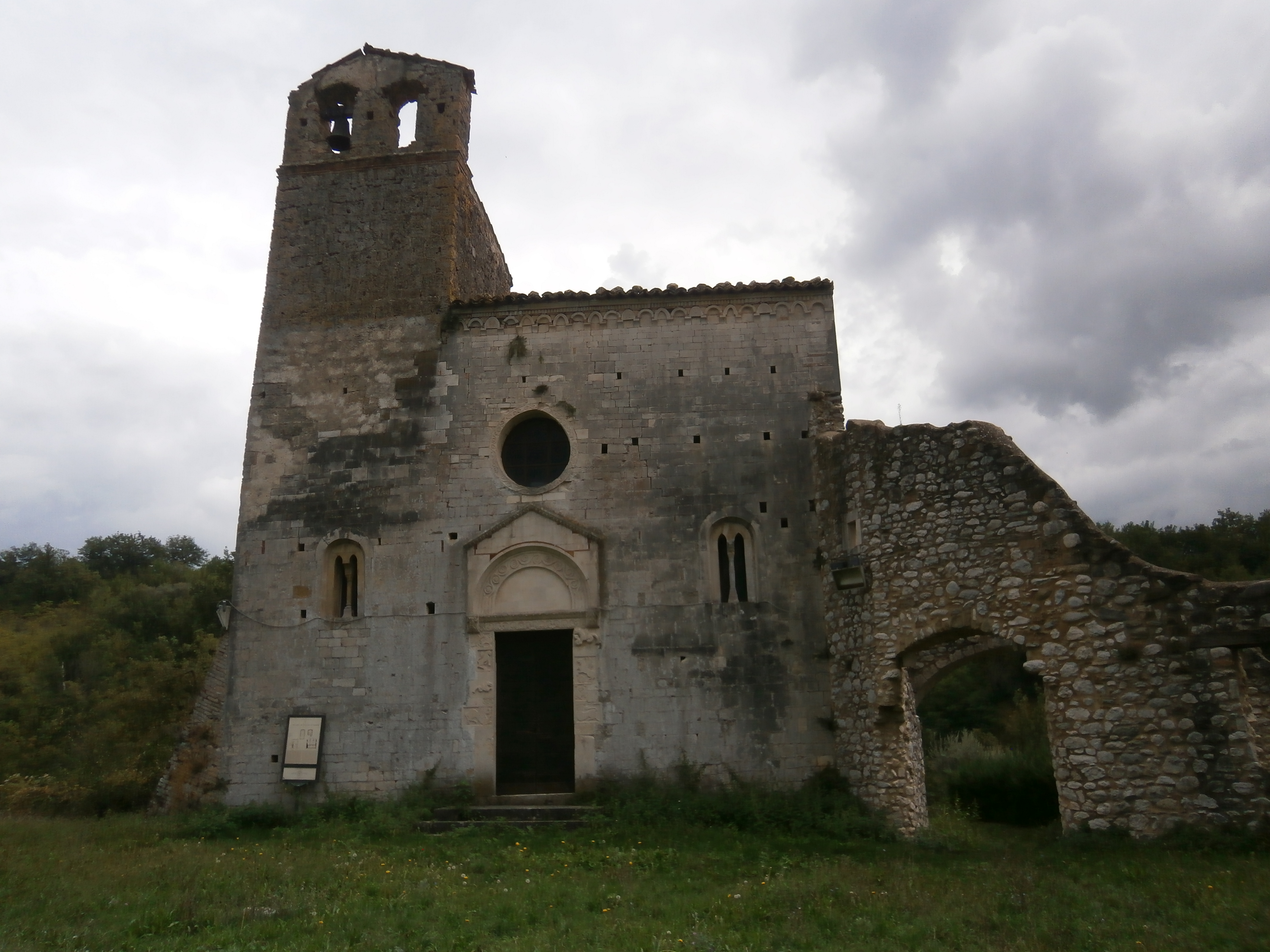 Facciata